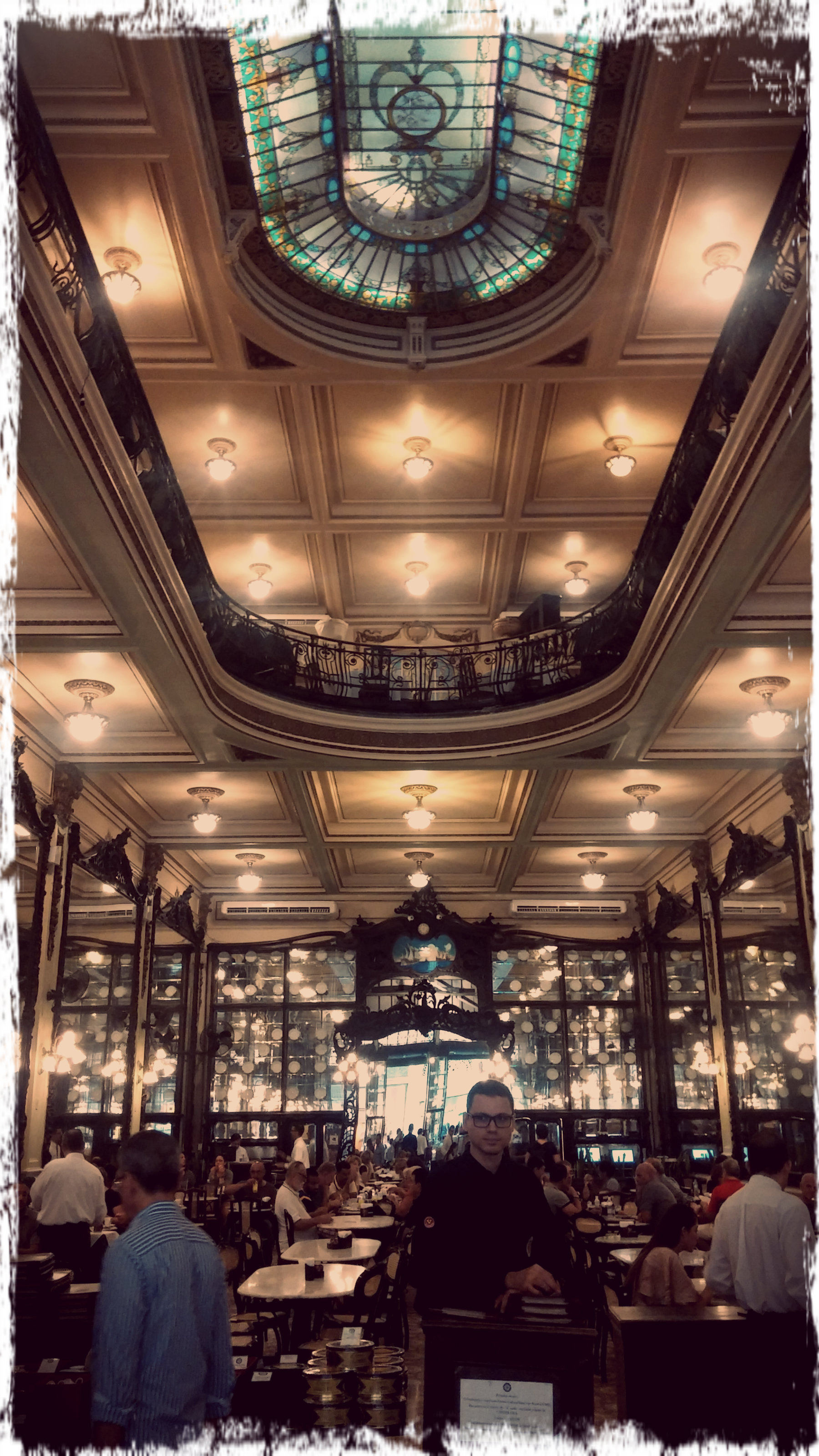 Ingreso a la Confitería Colombo